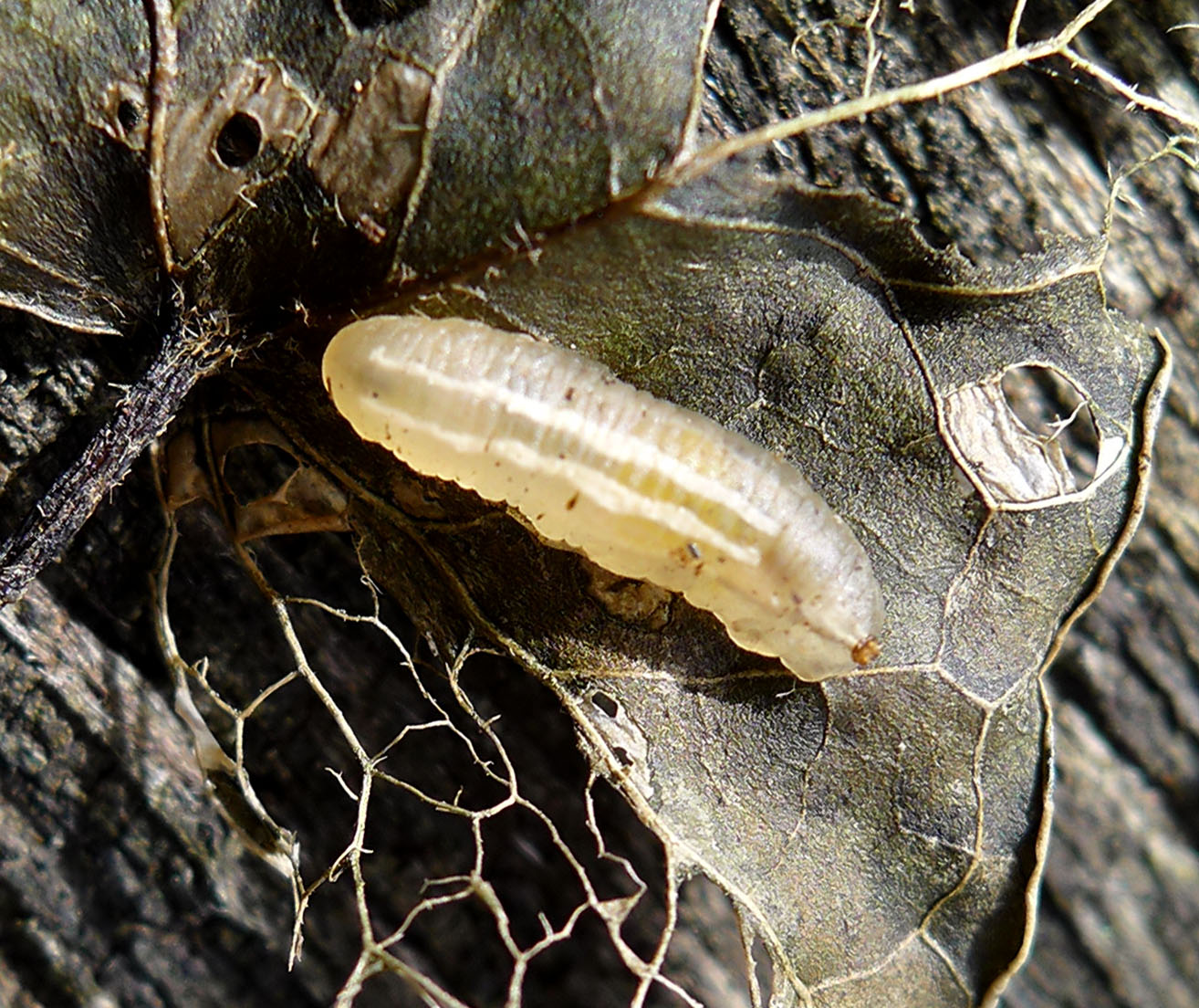 Hoverfly larvae. Syrphus sp?